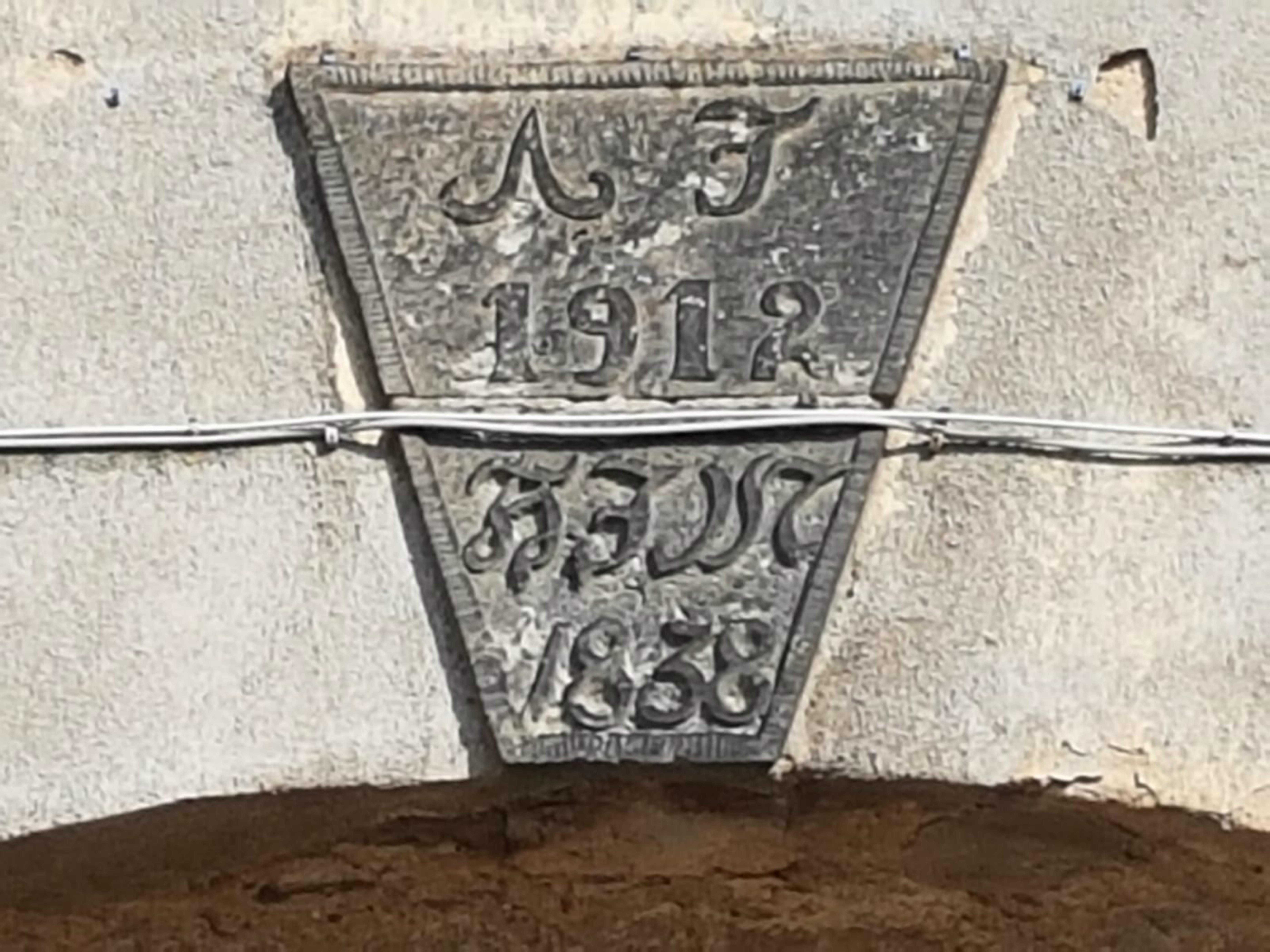 Das Herrenhaus des ehemaligen Ritterguts Burkartshain. Im Schlußstein ist das Monogramm HJM für Hans Jakob Mettler mit der Jahreszahl 1838 dem Erbauer des HH und AJ für Alfred Jakob, welcher 1912 das HH umbauen liess. Schlußstein